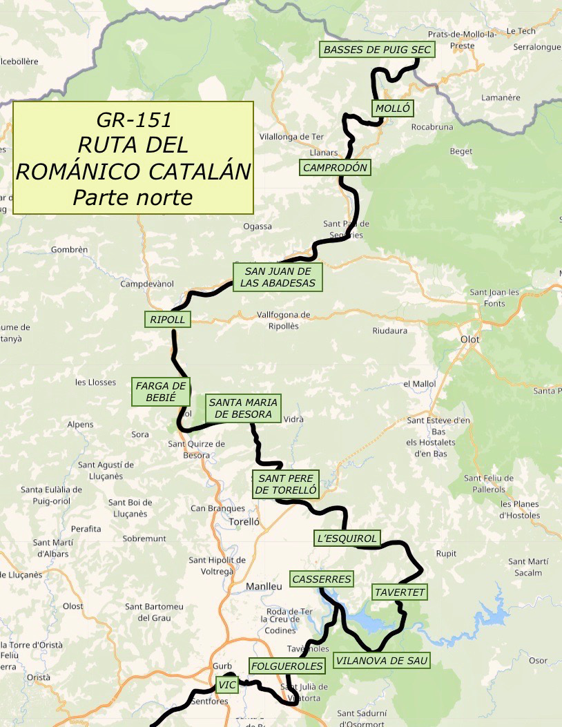 Mapa sendero GR-3 norte románico catalán milenario Abad Oliva